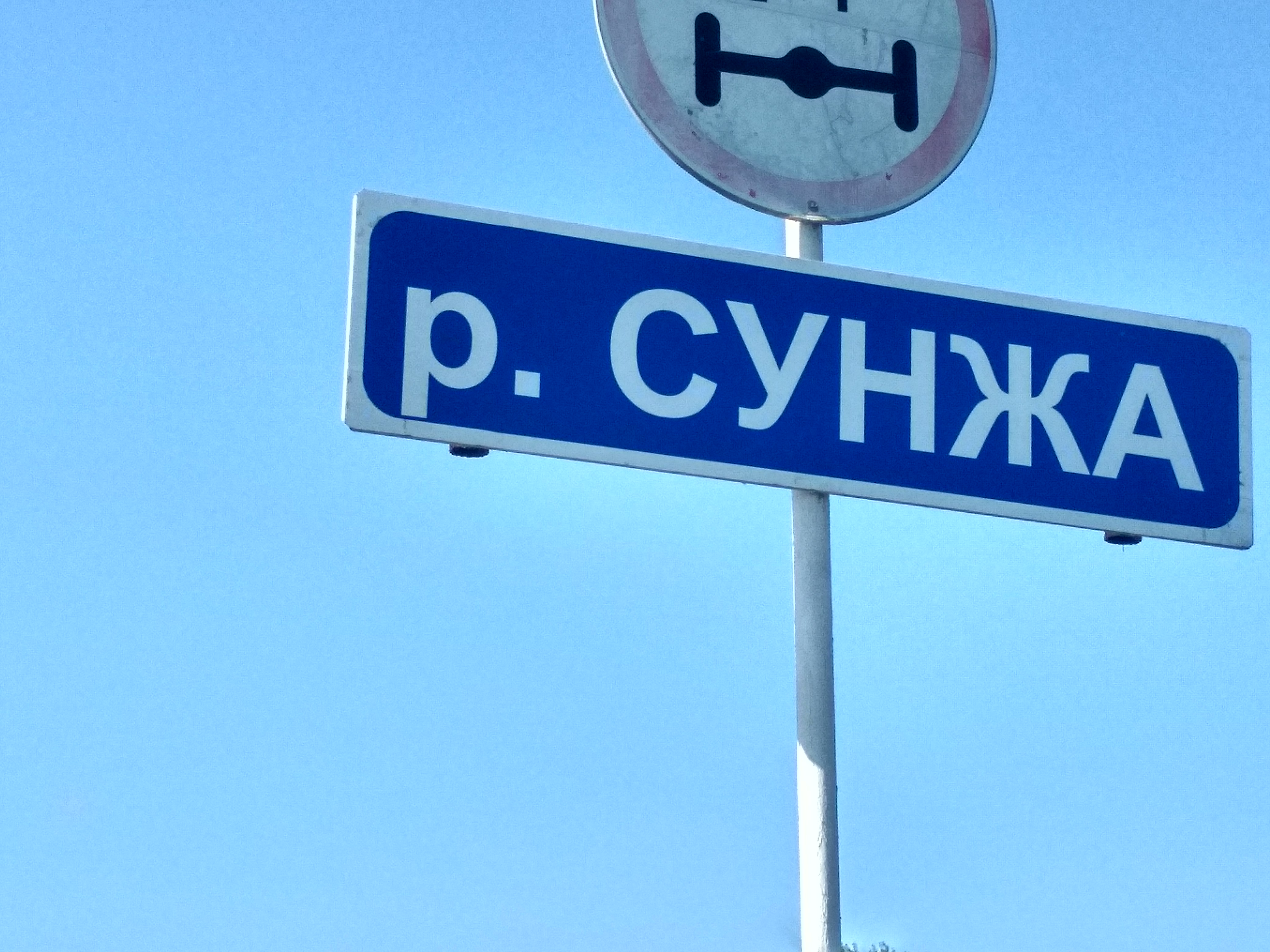 Нохчийн: Сольжа хи